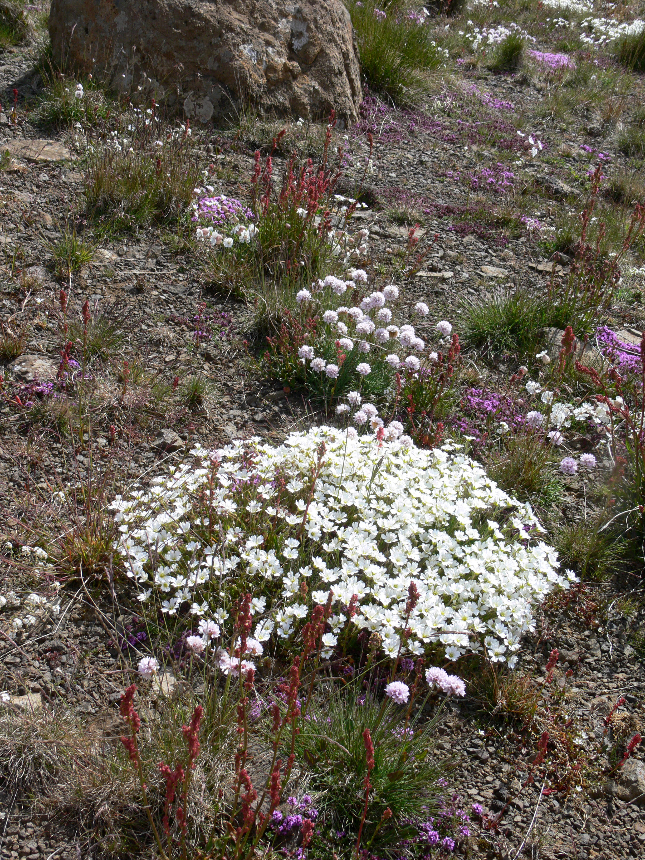 Weiße Silberwurz (Dryas octopetala – really?)(not D. octopetala. Richard Avery (talk) 18:48, 8 July 2014 (UTC)) in Kaldidalur, Island. Arctic tundra, mixed vegetation of: Armeria, Cerastium, Festuca, Rumex, Silene, Thymus.